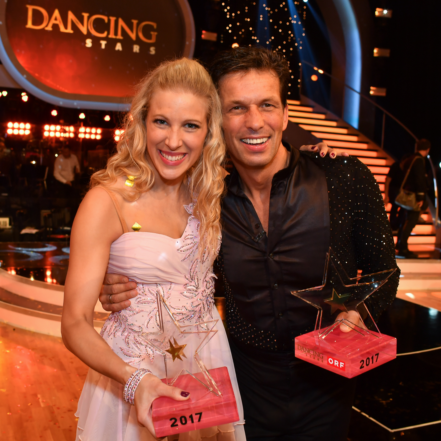 ORF Dancing Stars Finale am 2.6.2017 im ORF-Zentrum Wien. Bild zeigt die Sieger Maria Santner und Martin Ferdiny.